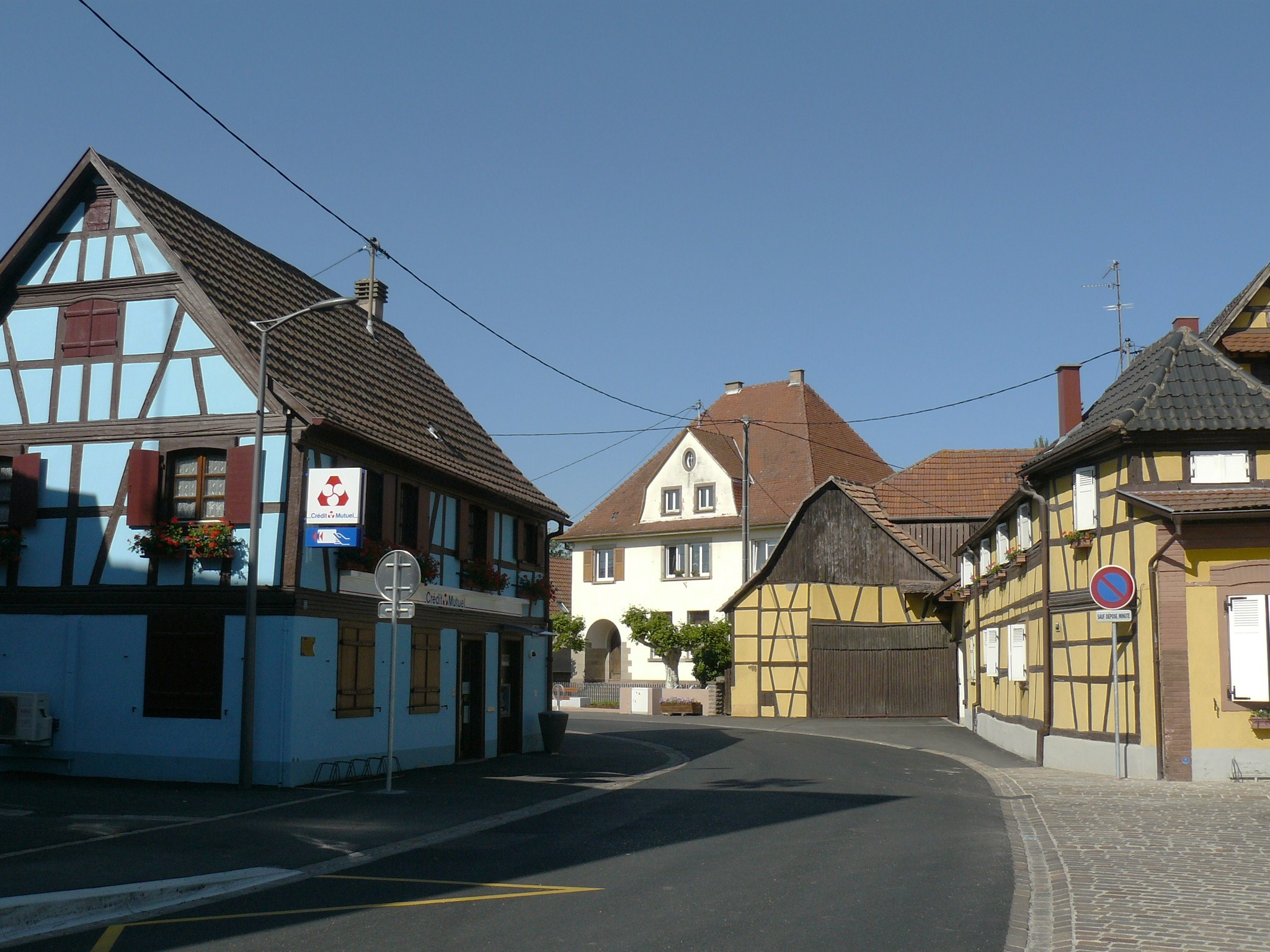 Les maisons à colombages